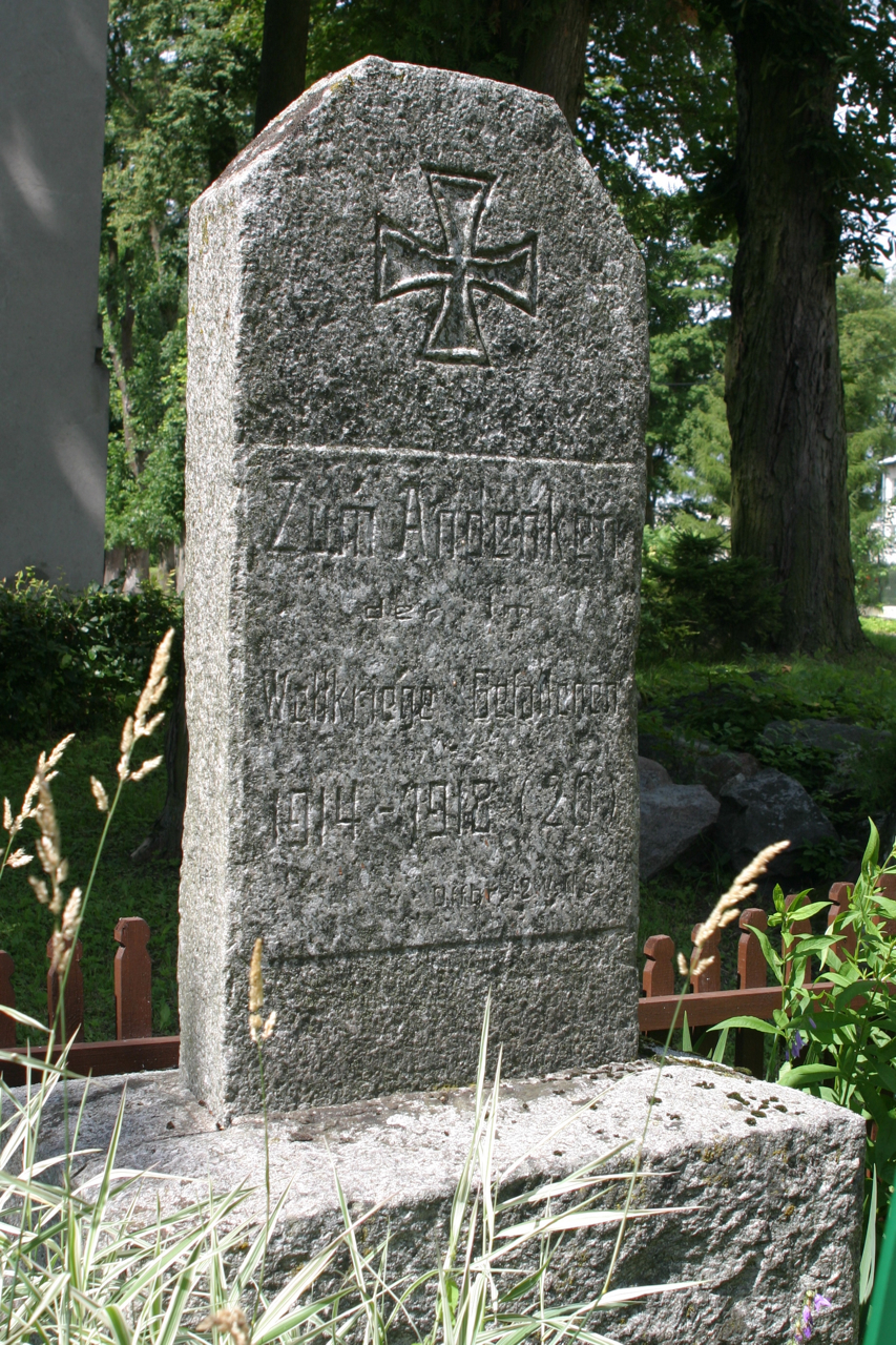 Nakomiady